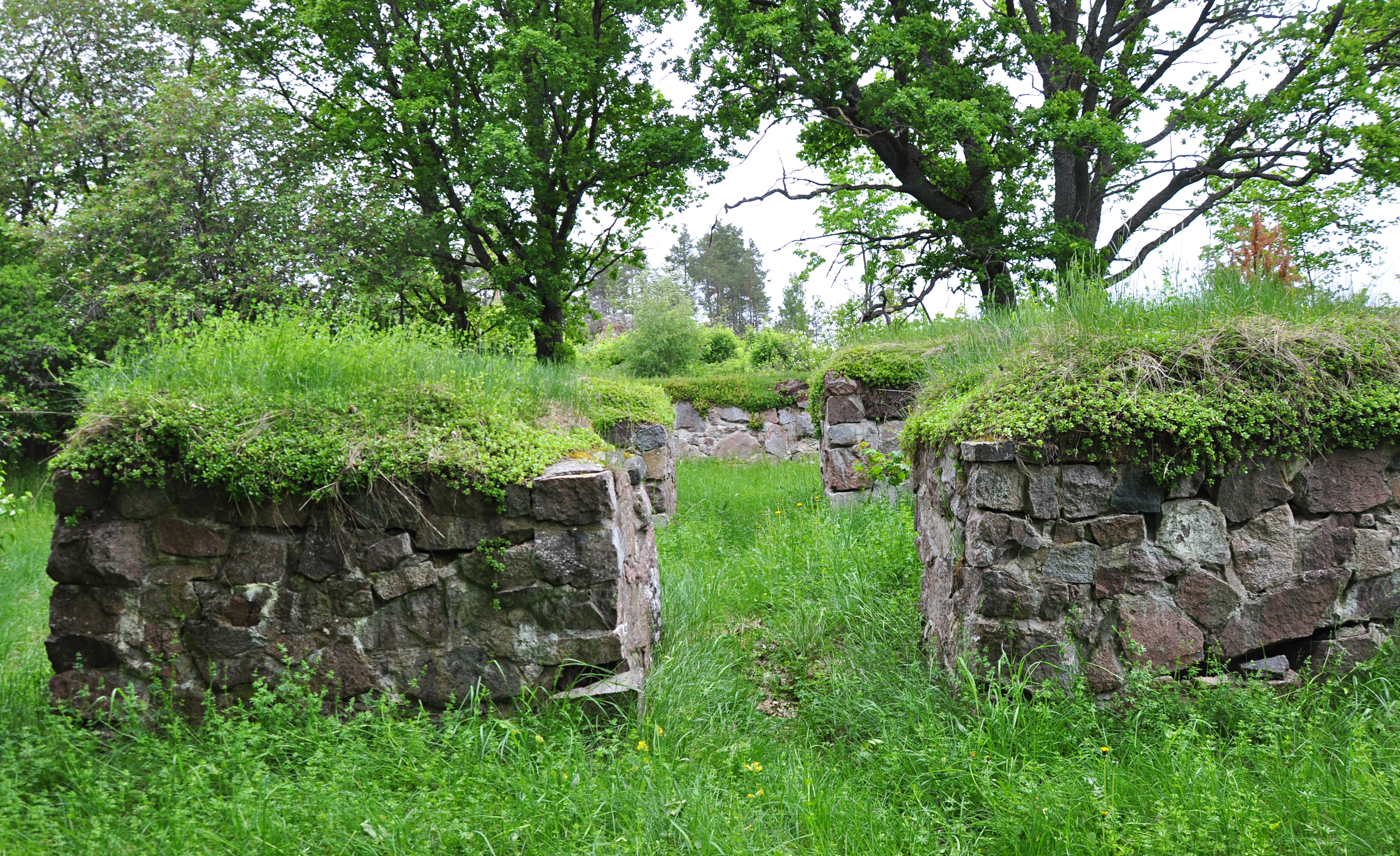 Ärja kyrkoruin i Södermanland. Entrén i före detta vapenhuset.